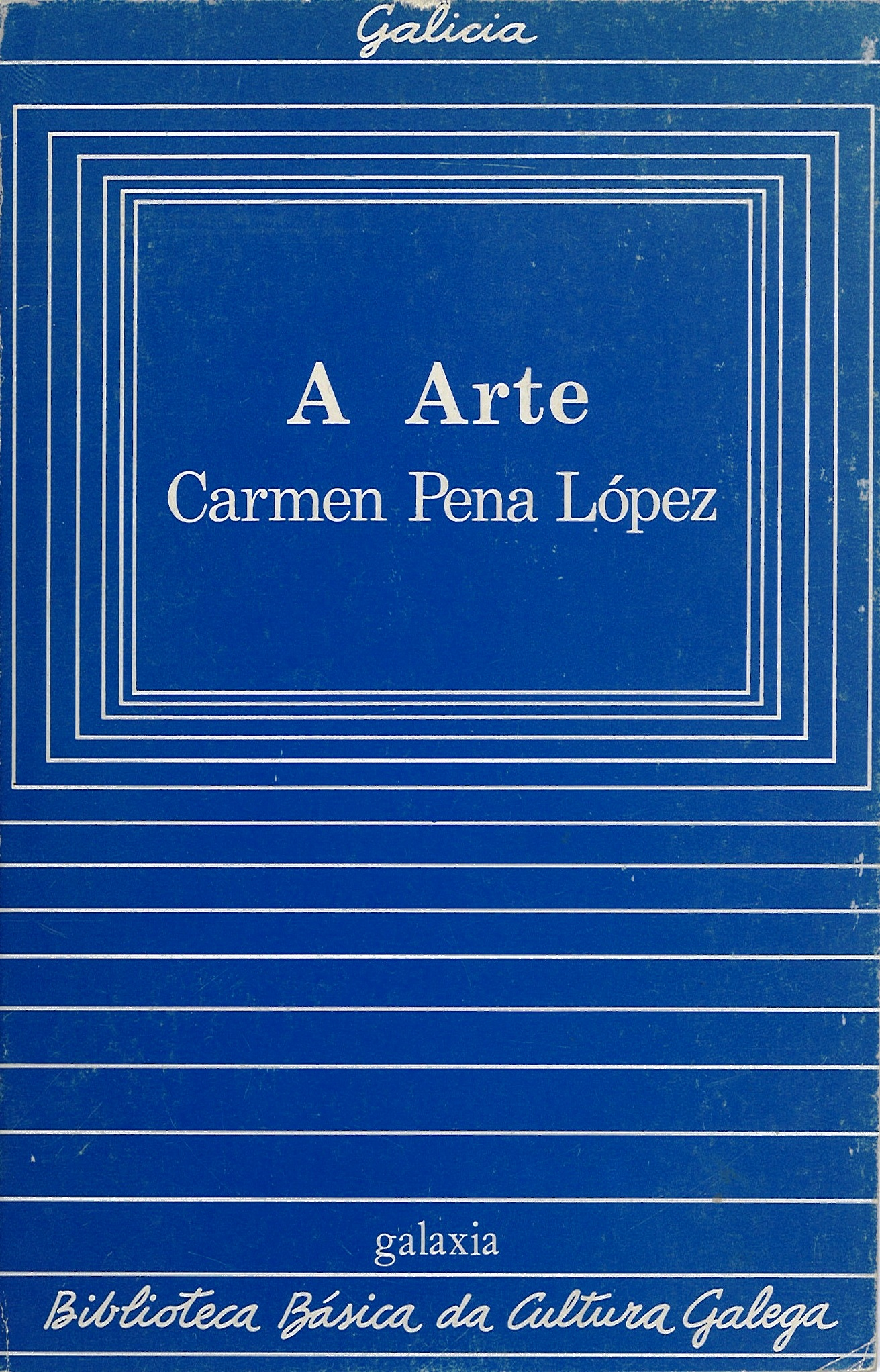 Biblioteca Básica da Cultura Galega, 04, A arte, Carmen Pena López.jpg